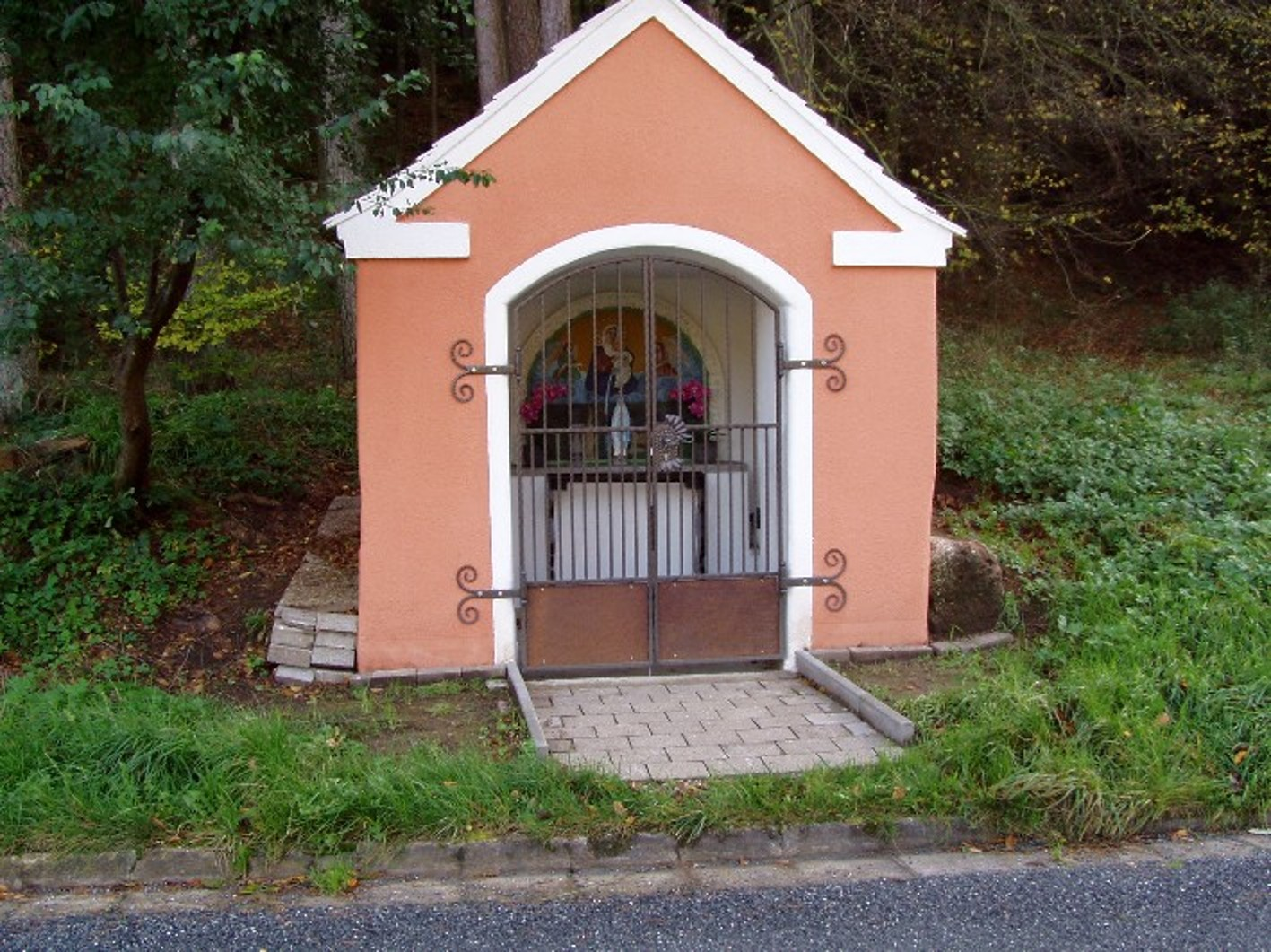 Hohenrad Wegkapelle renoviert 2014This is a photograph of an architectural monument.